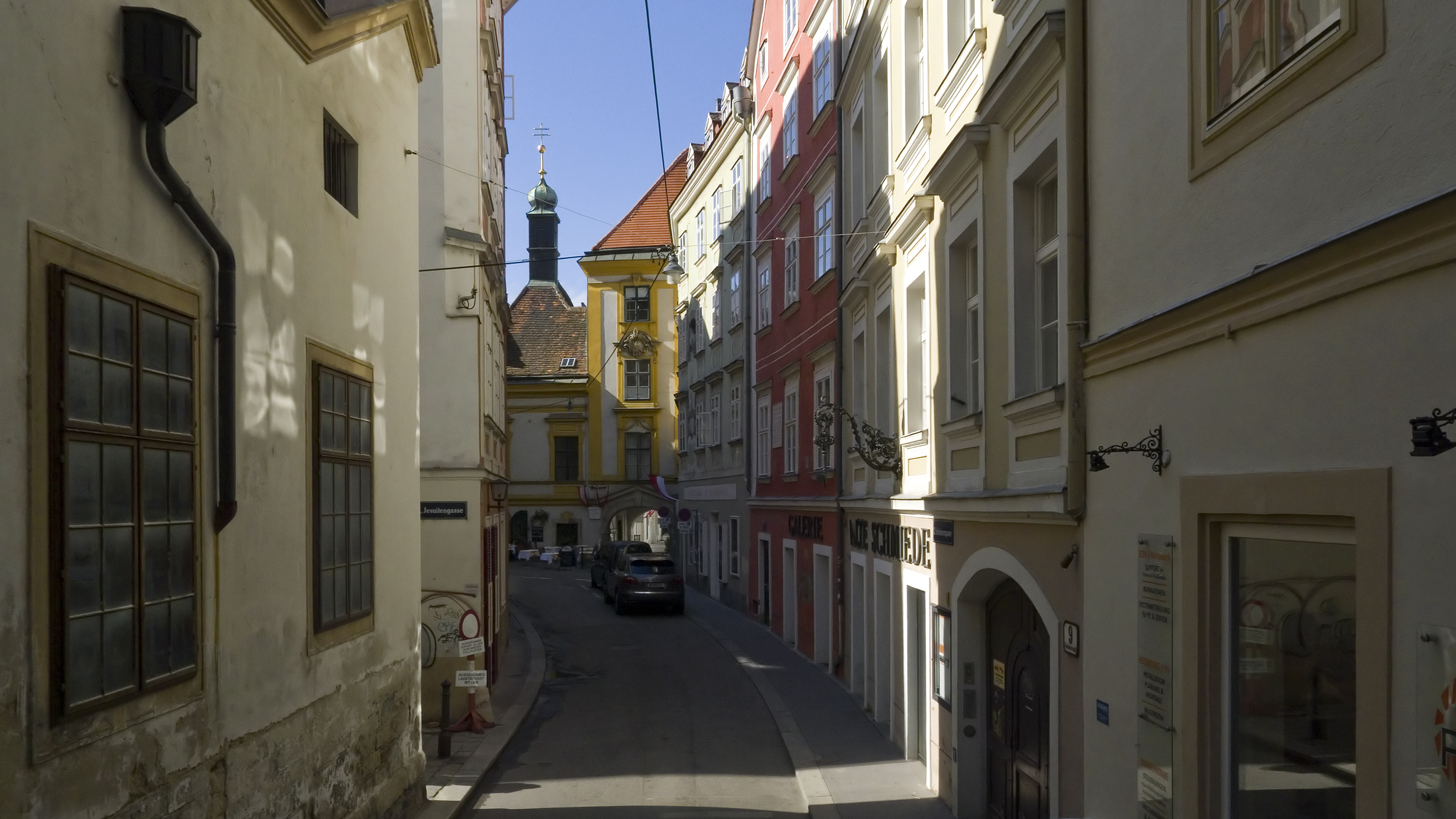 Schönlaterngasse in Wien 1 bei Nr. 11 Richtung Westen